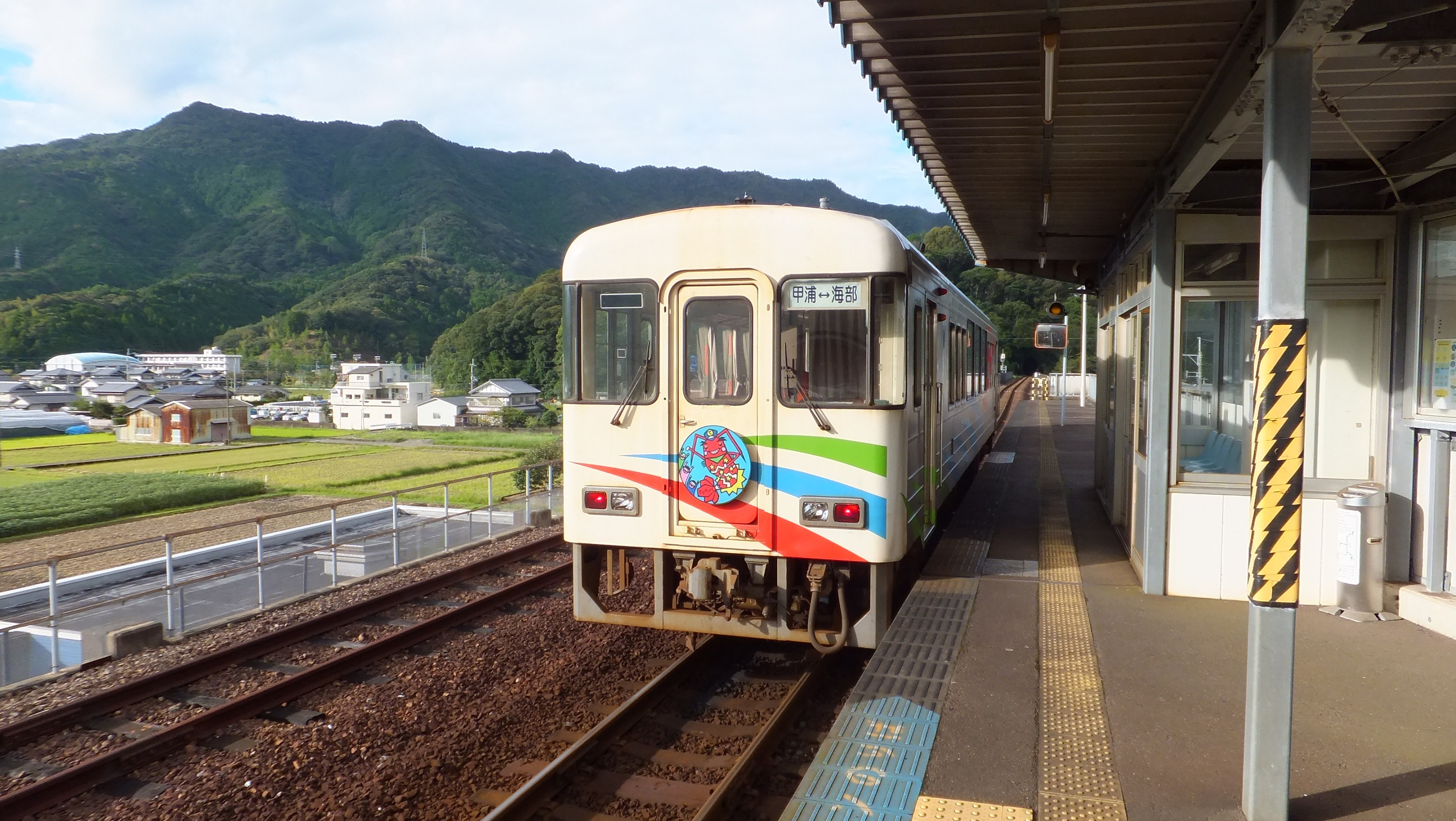 宍喰駅停車中のASA101「しおかぜ」 ヘッドマークが伊勢えび駅長 （徳島県海部郡海陽町 2015年）